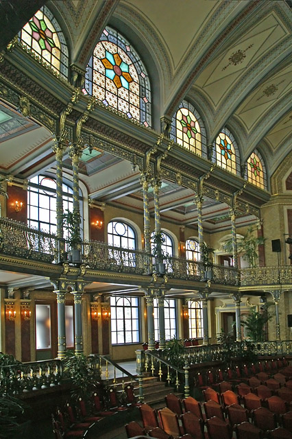 Kurhaus Augsburg-Goeggingen